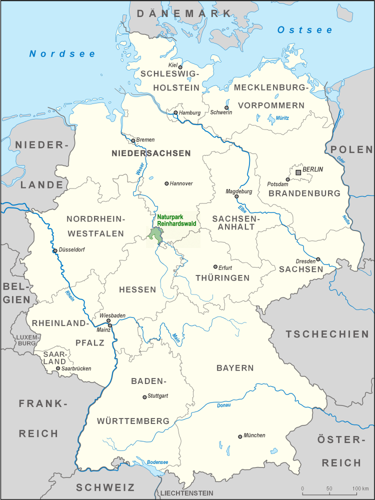 Karte des Naturparks Reinhardswald in Deutschland